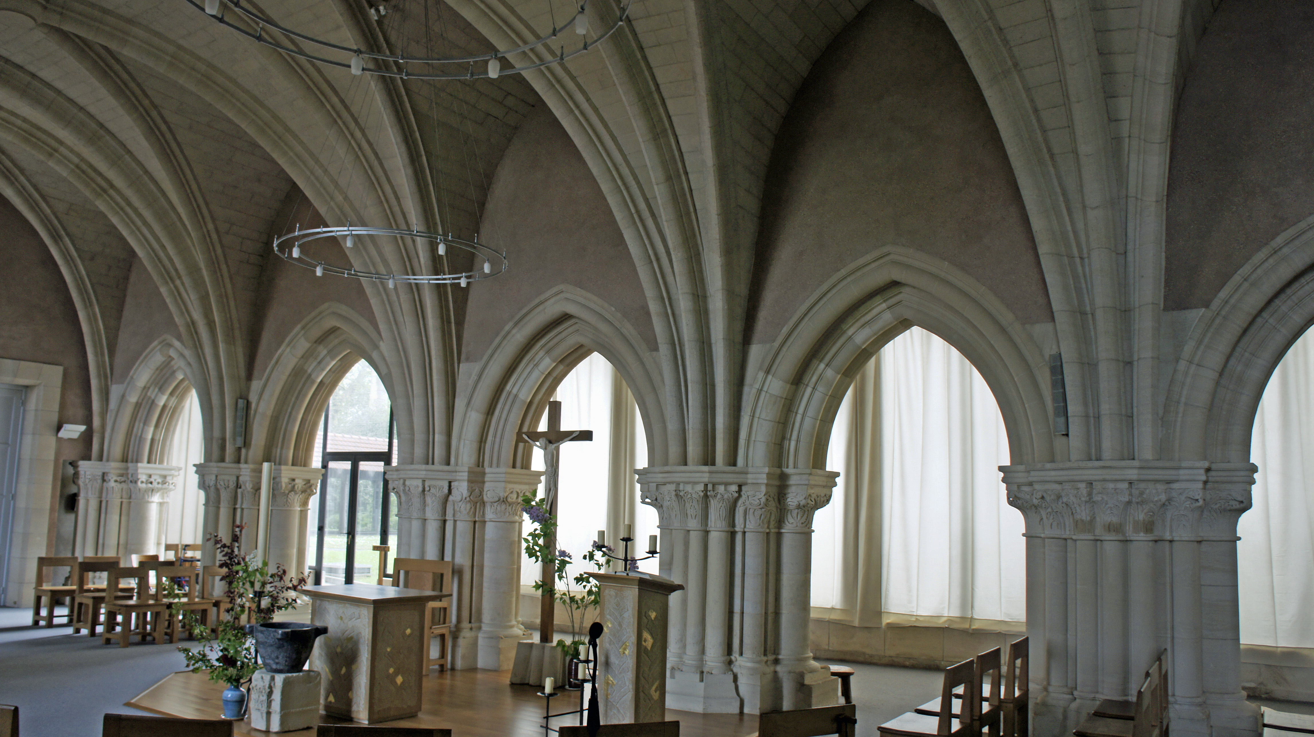 Salle capitulaire en l'Abbaye Saint-Thierry du mont d'Hor.